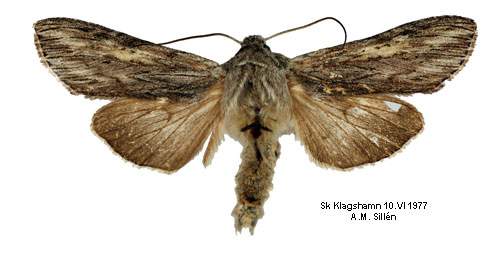 Cucullia praecana.